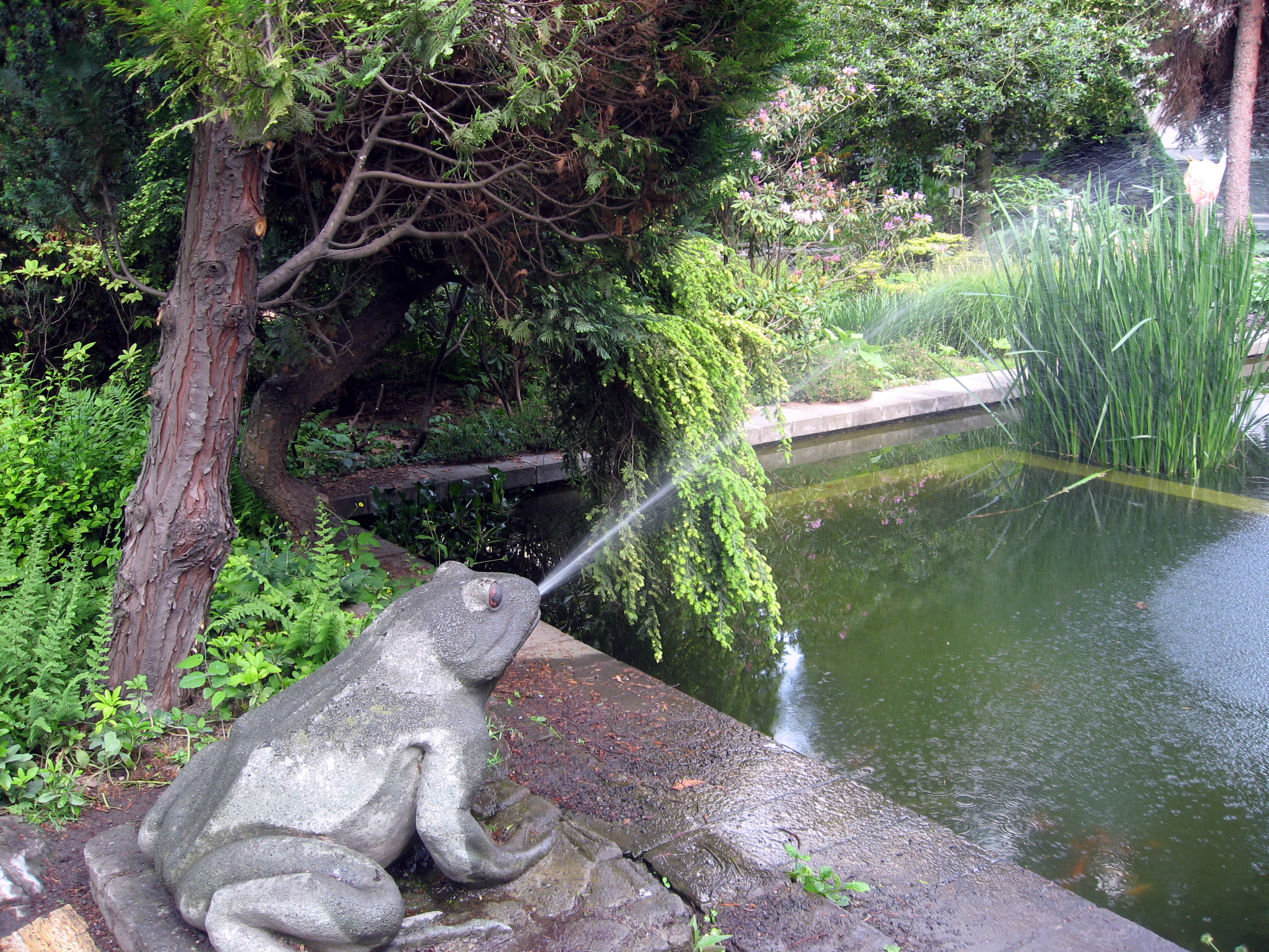 Botanická zahrada Přírodovědecké fakulty Masarykovy univerzity